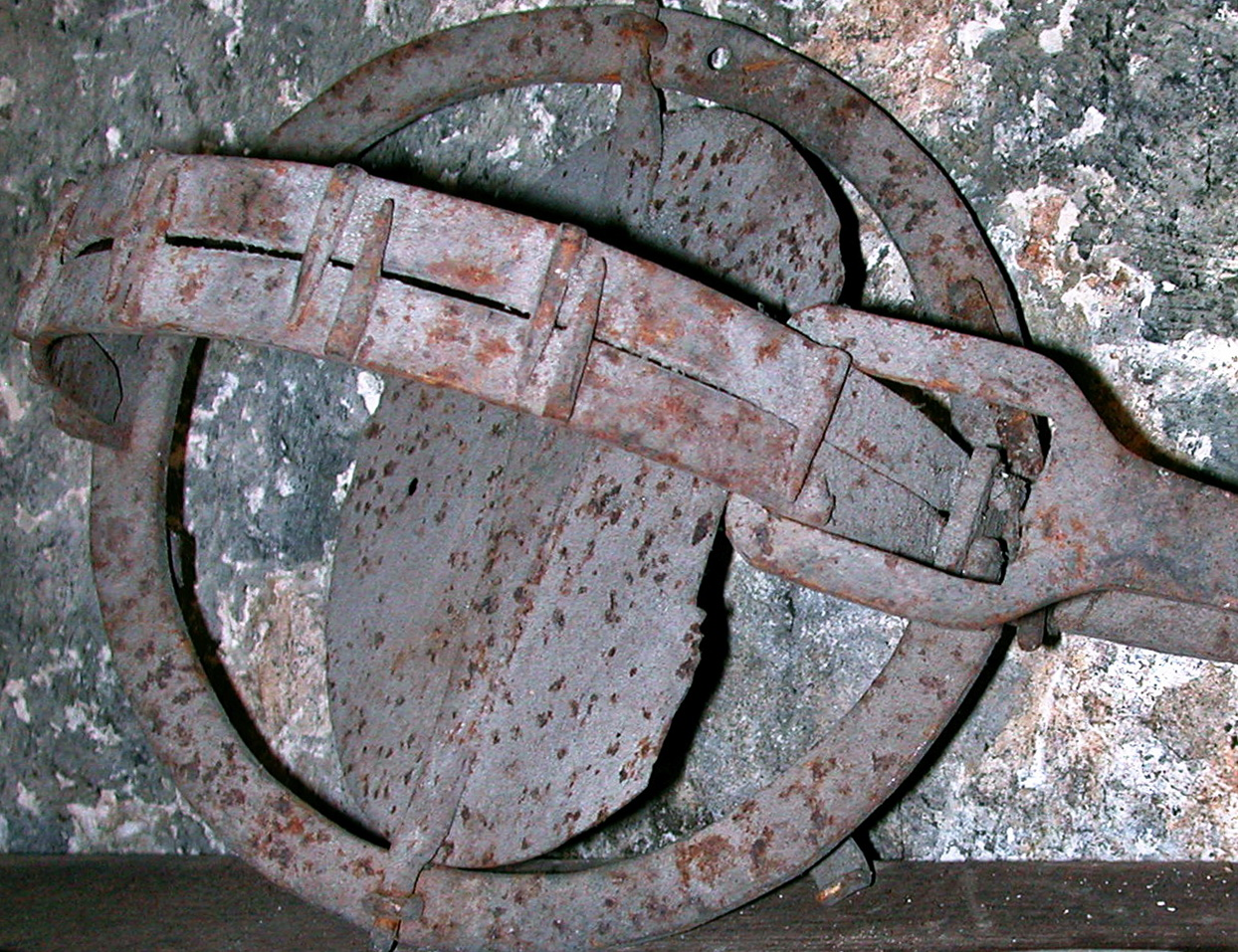 piège à loup